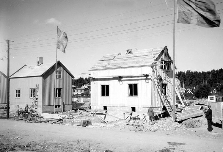 Snabbresning av hus på Herrhagsvägen 29 i Svedmyra småstugeområde